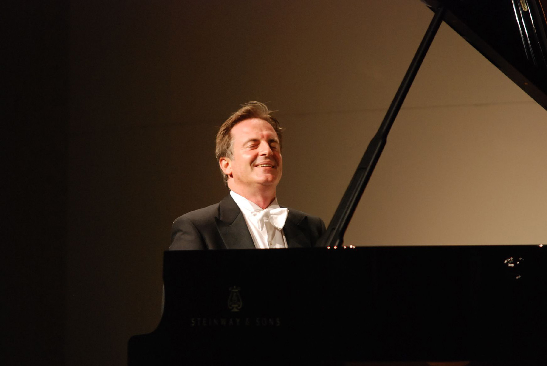 Alfredo Perl beim Rheingau Musik Festival